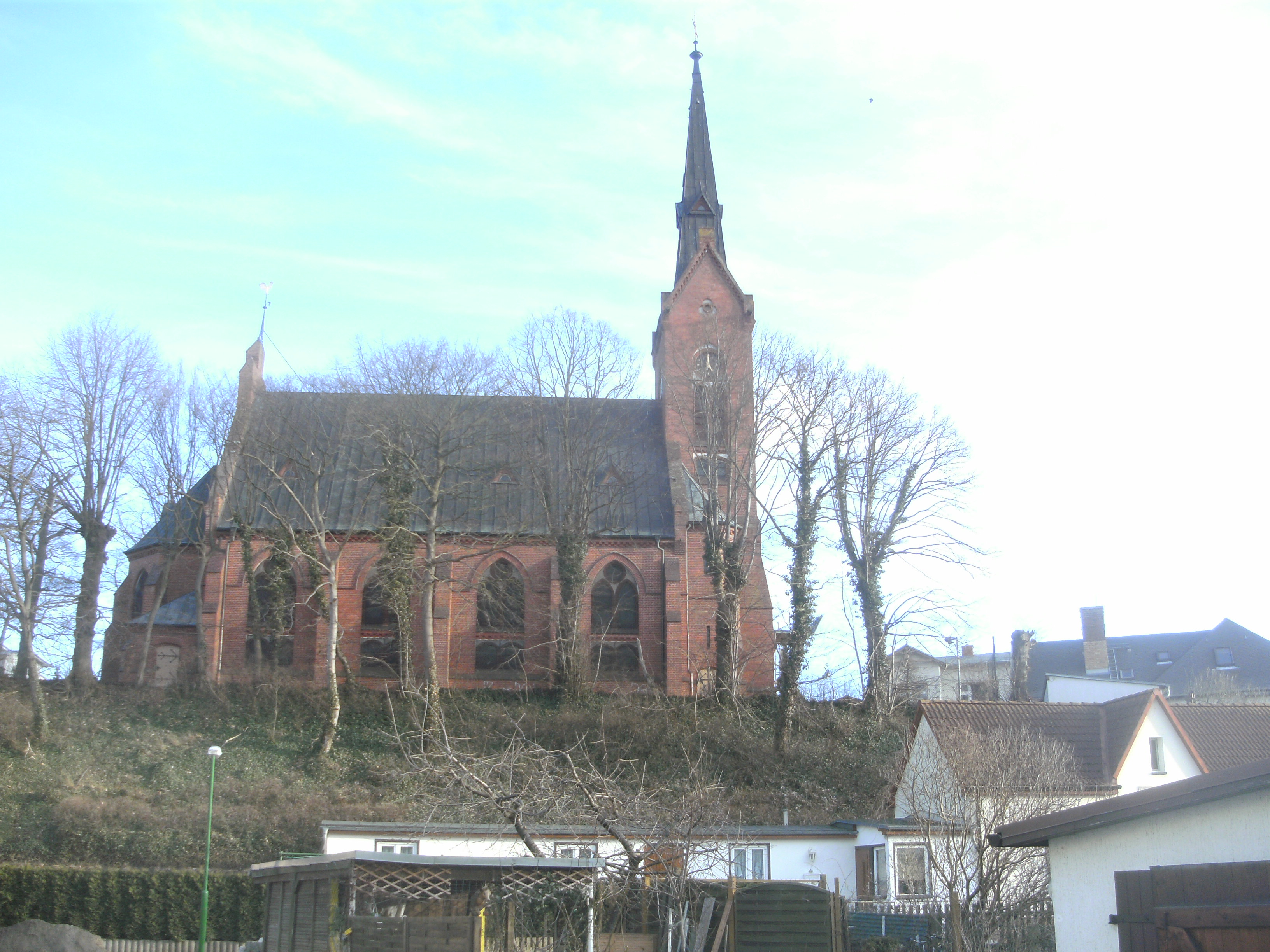 Kirche in Zinnowitz (Usedom), von der Seite gesehen.